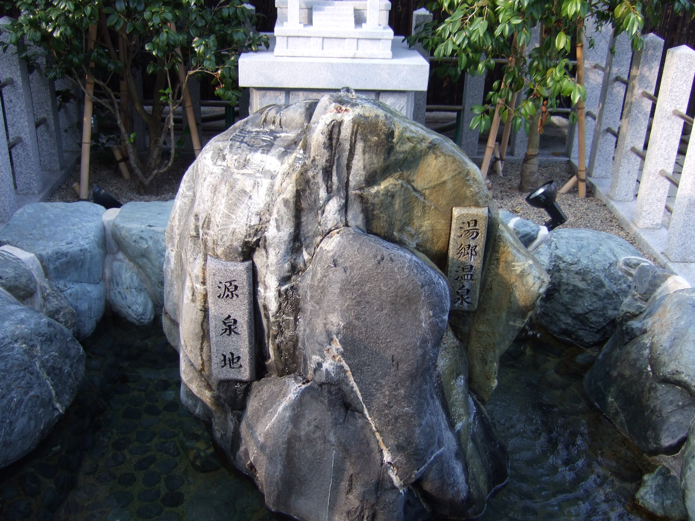 湯郷